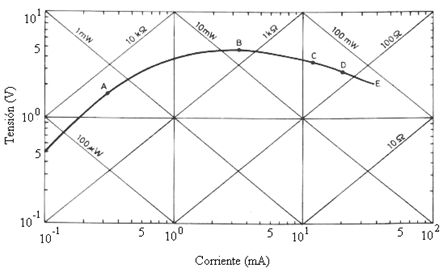 Característica tensión-corriente de un termistor NTC en la que se reflejan los efectos del autocalentamiento